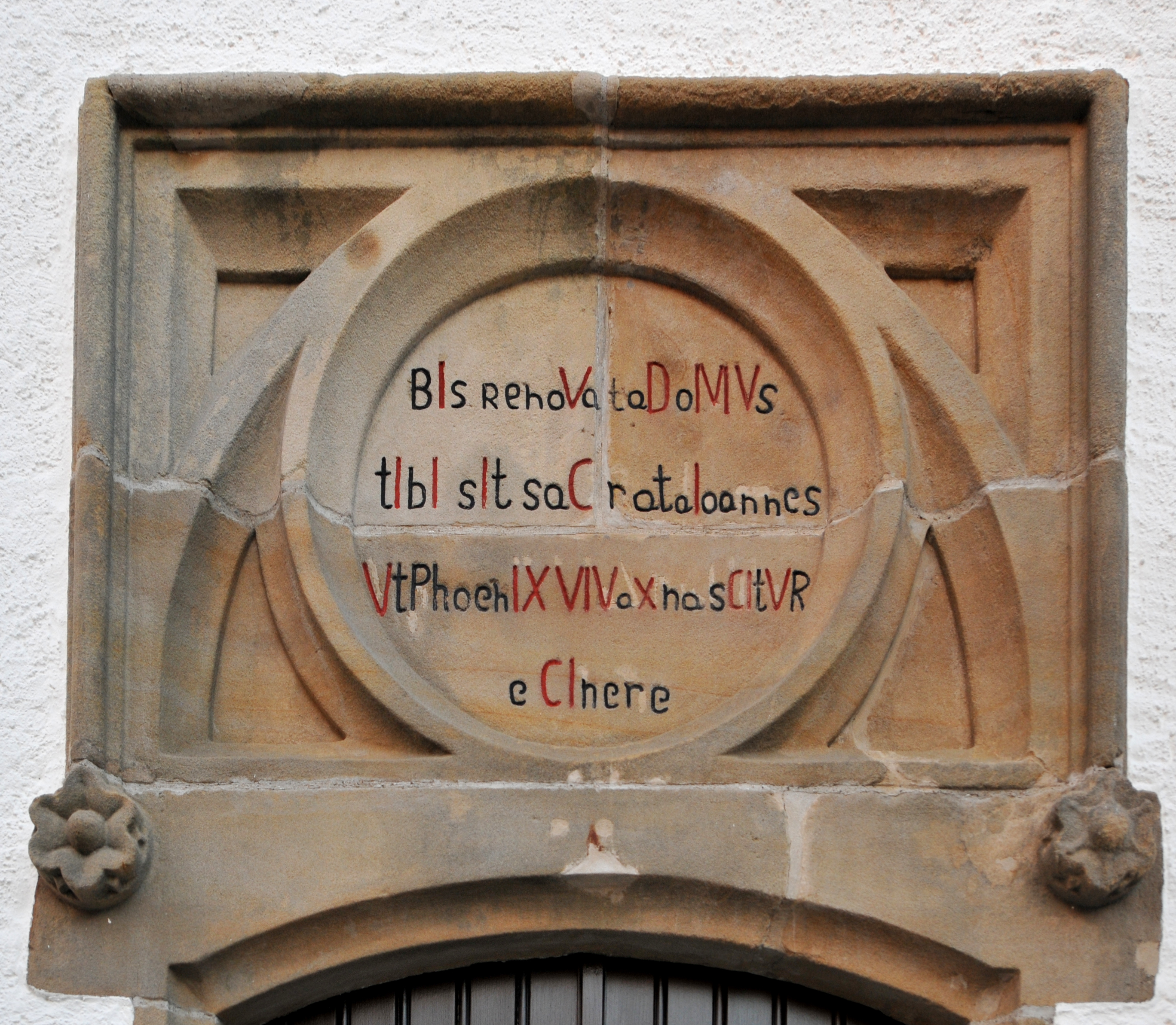 De Chronogram (1859) iwwer der Entree vun der Kierch zu Elveng. Church of St Jean, Elvange, Luxembourg. Latin text, commemorating a second rebuilding after a fire: Bis renovata domus tibi sit sacrata Joannes ut Phoenix vivax nascitur e cinere ("A home twice renewed for you; may it be sacred; John like a Phoenix is born alive from the ash"). The taller letters when taken individually as Roman numerals add to 1,859, the date of the second rebuilding.